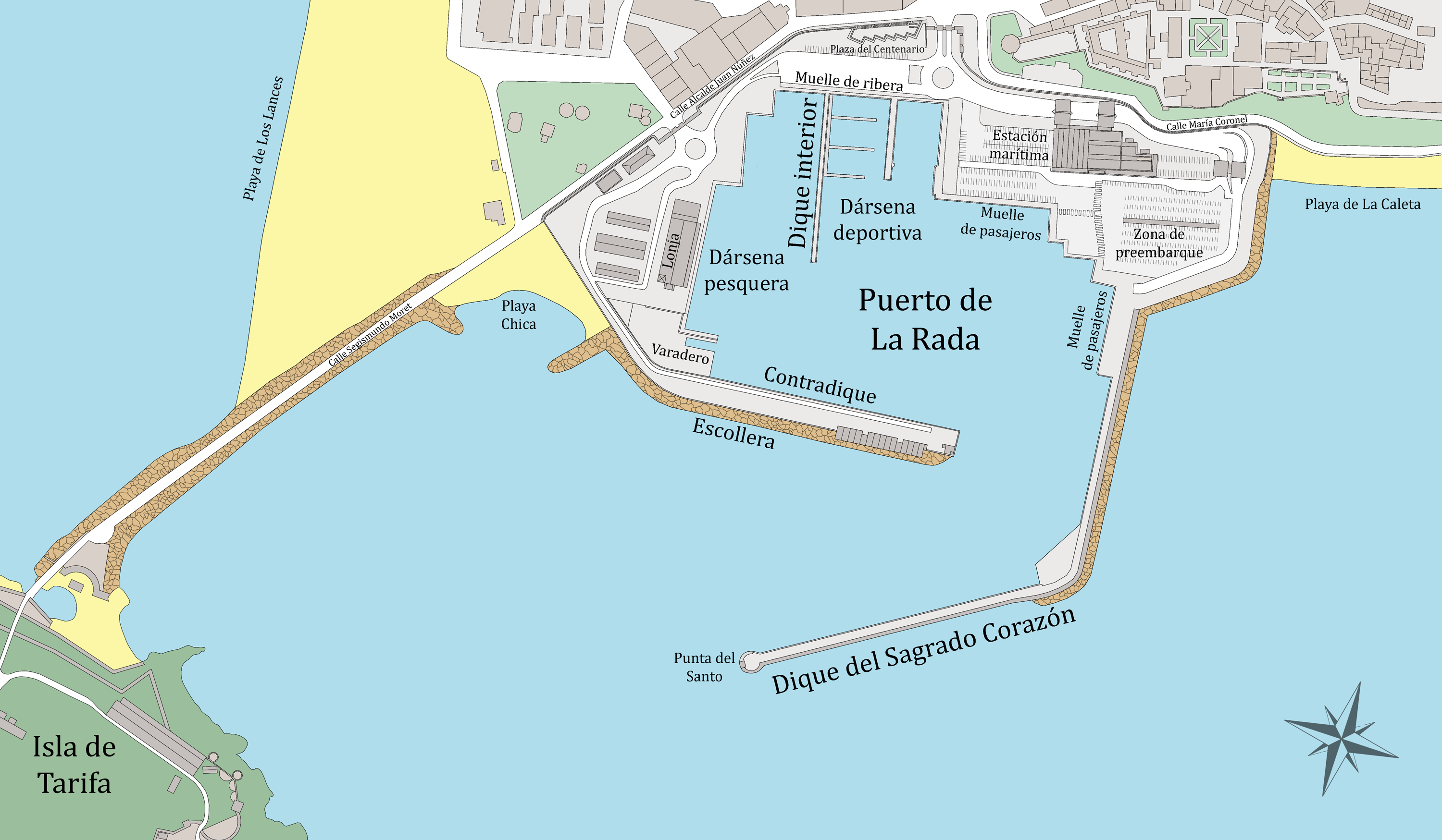 Plano del puerto de Tarifa, Andalucía, España